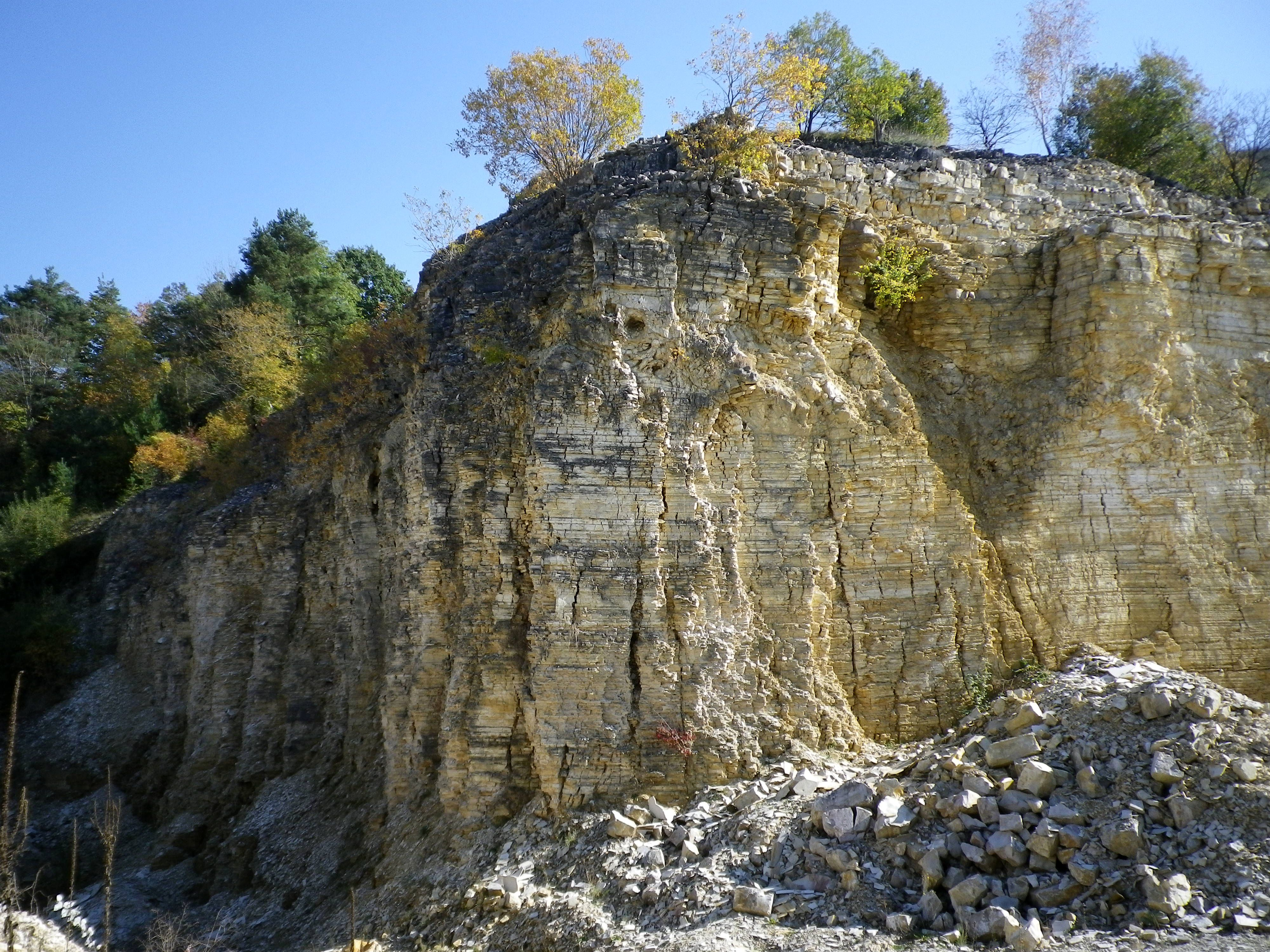 Steinbruch in Ettling